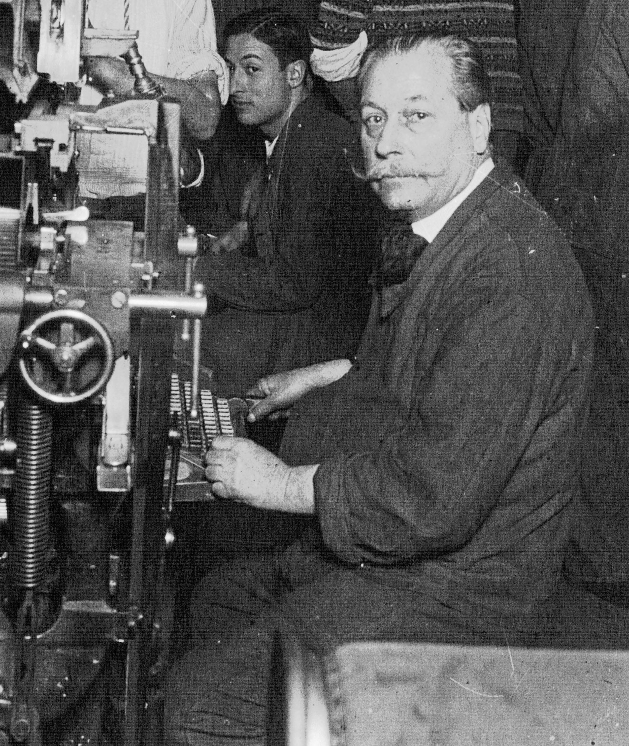 Émile Chautard, écrivain-typographe, en 1929